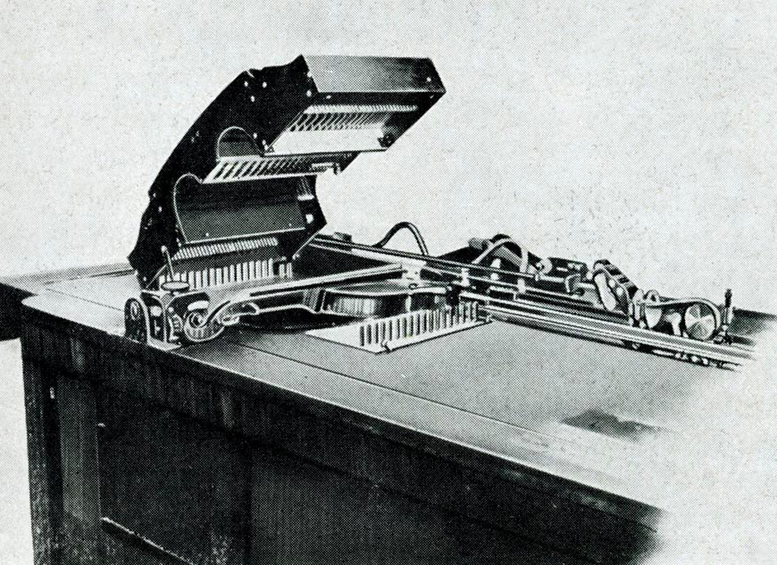 gravure montrant un violonista